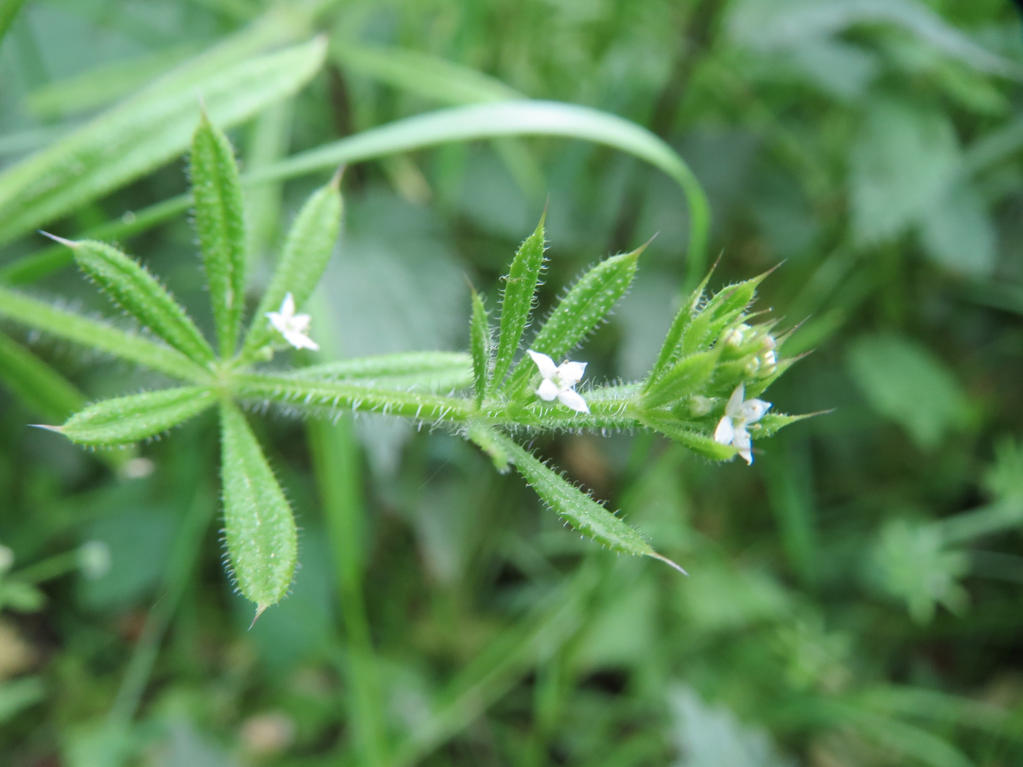 Kletten-Labkraut (Galium aparine) im Waldschutzgebiet "Schwetzinger Hardt"